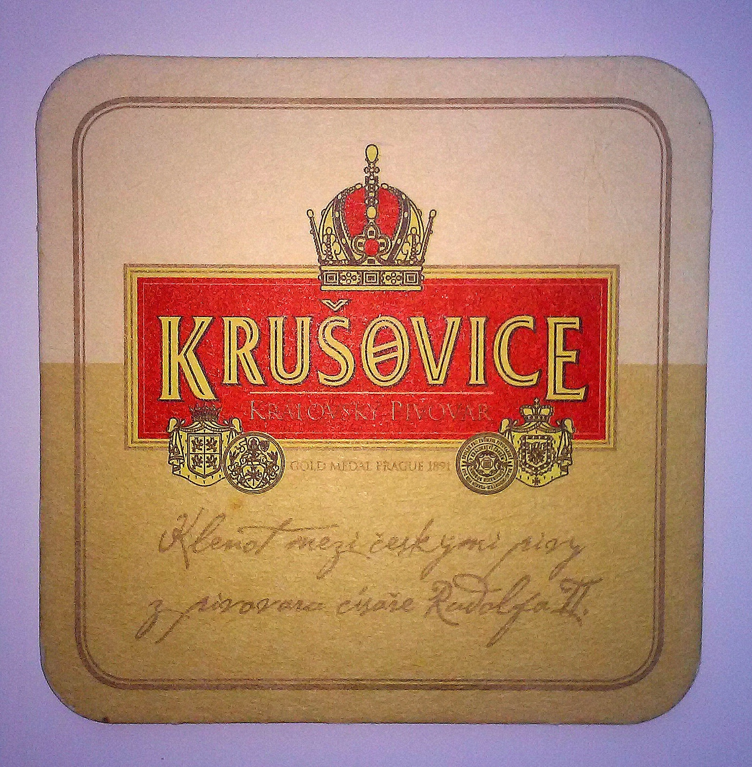 Podstawka pod piwo Krušovice